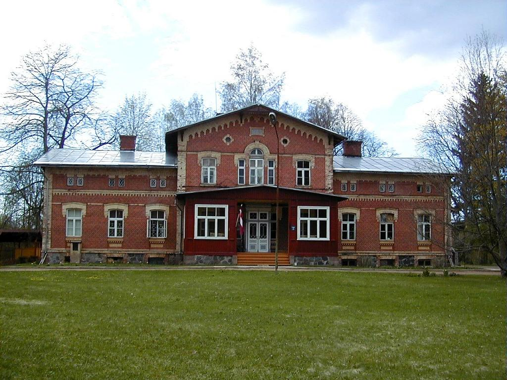 Vīķu muižas pils 2002-05-01